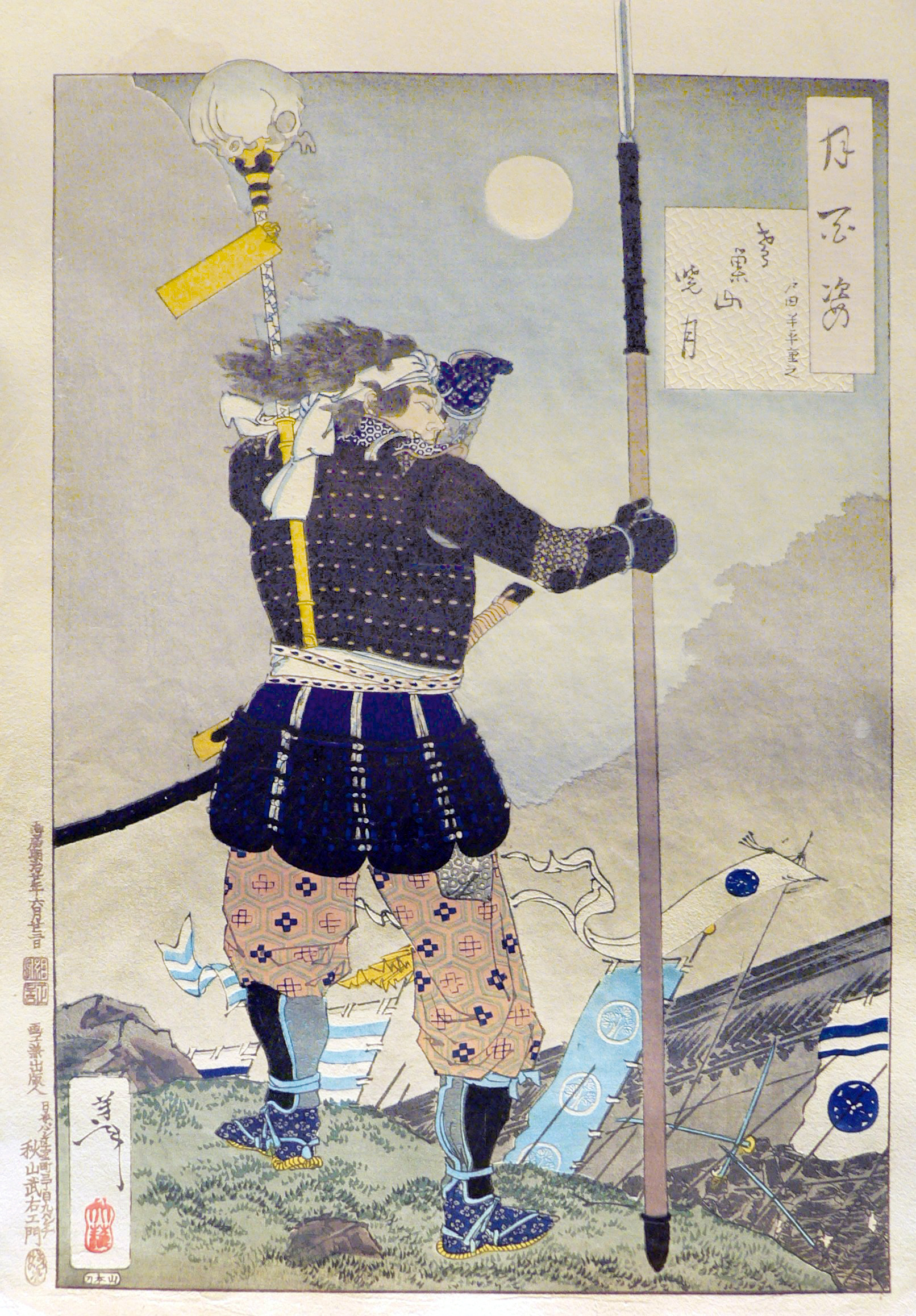 Général lançant ses troupes à l'assaut du château de Nagashino en 1575. Estampe de la série Tsuki hyaskushi ("100 aspects de la lune") de Taiso Yoshitoshi, 1887